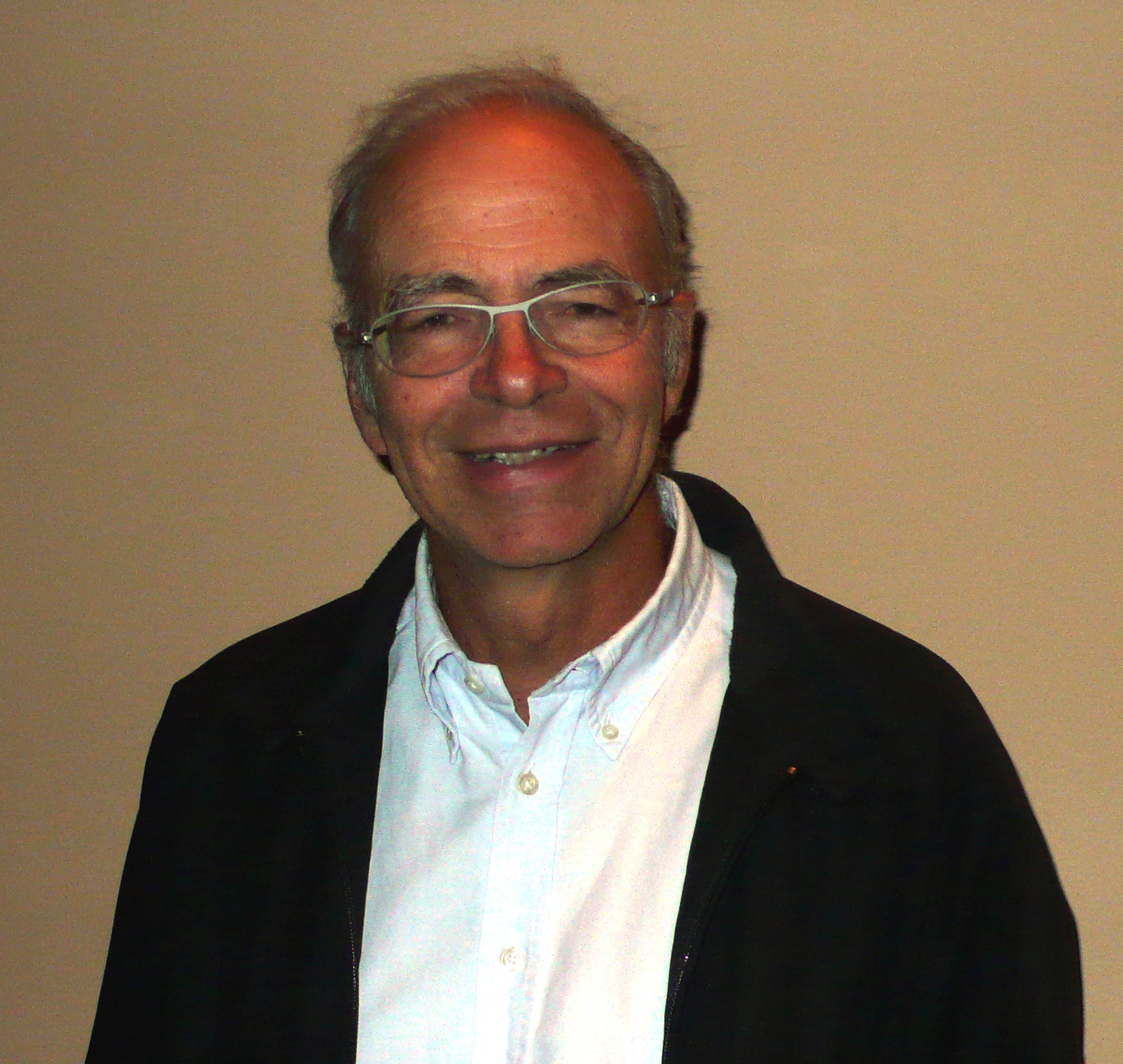 Peter Singer